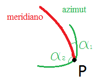 variazione azimut, modulo di deformazione lineare